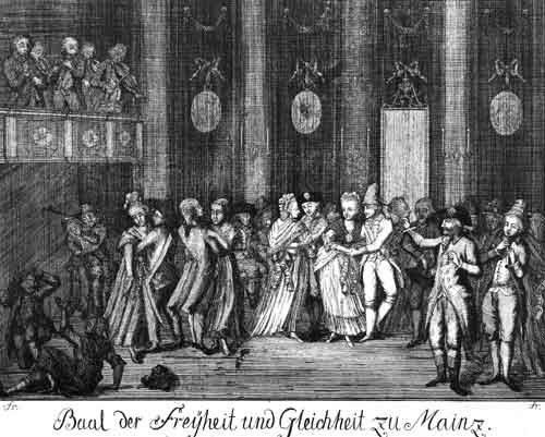 Klubisten im "Saal der Freiheit und Gleichheit" in Mainz; Akademiesaal des ehemaligen kurfürstlichen Schlosses.